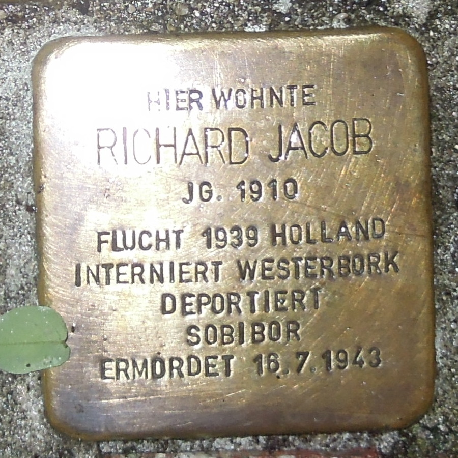 Stolperstein Geldern Gelderstraße 5 Richard Jacob